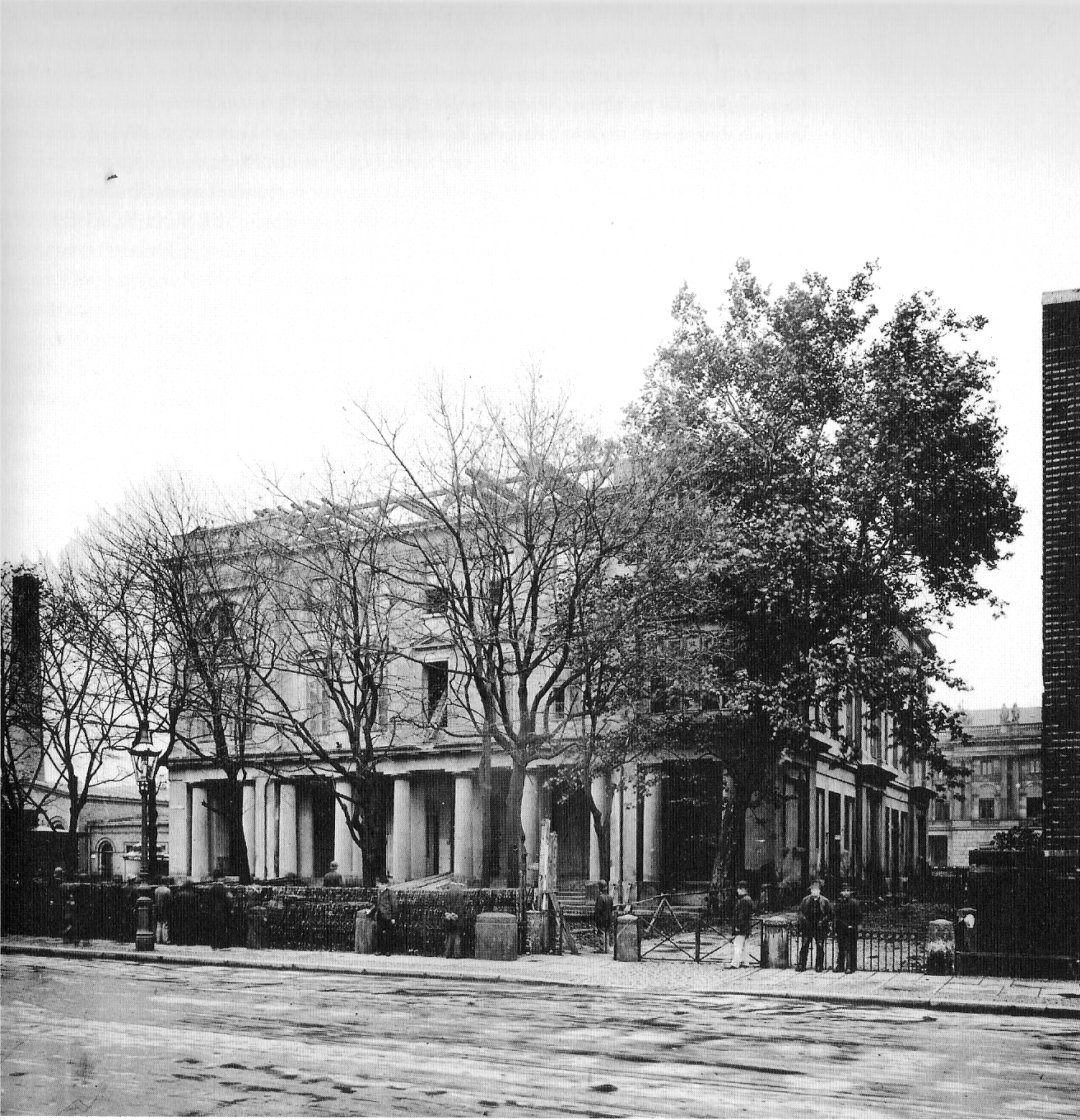 Berliner Alte Börse am Lustgarten. Abrissarbeiten.